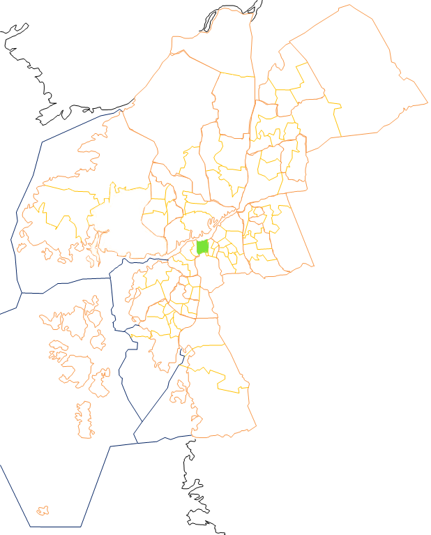 Karta som visar primärområdes belägenhet i Göteborg